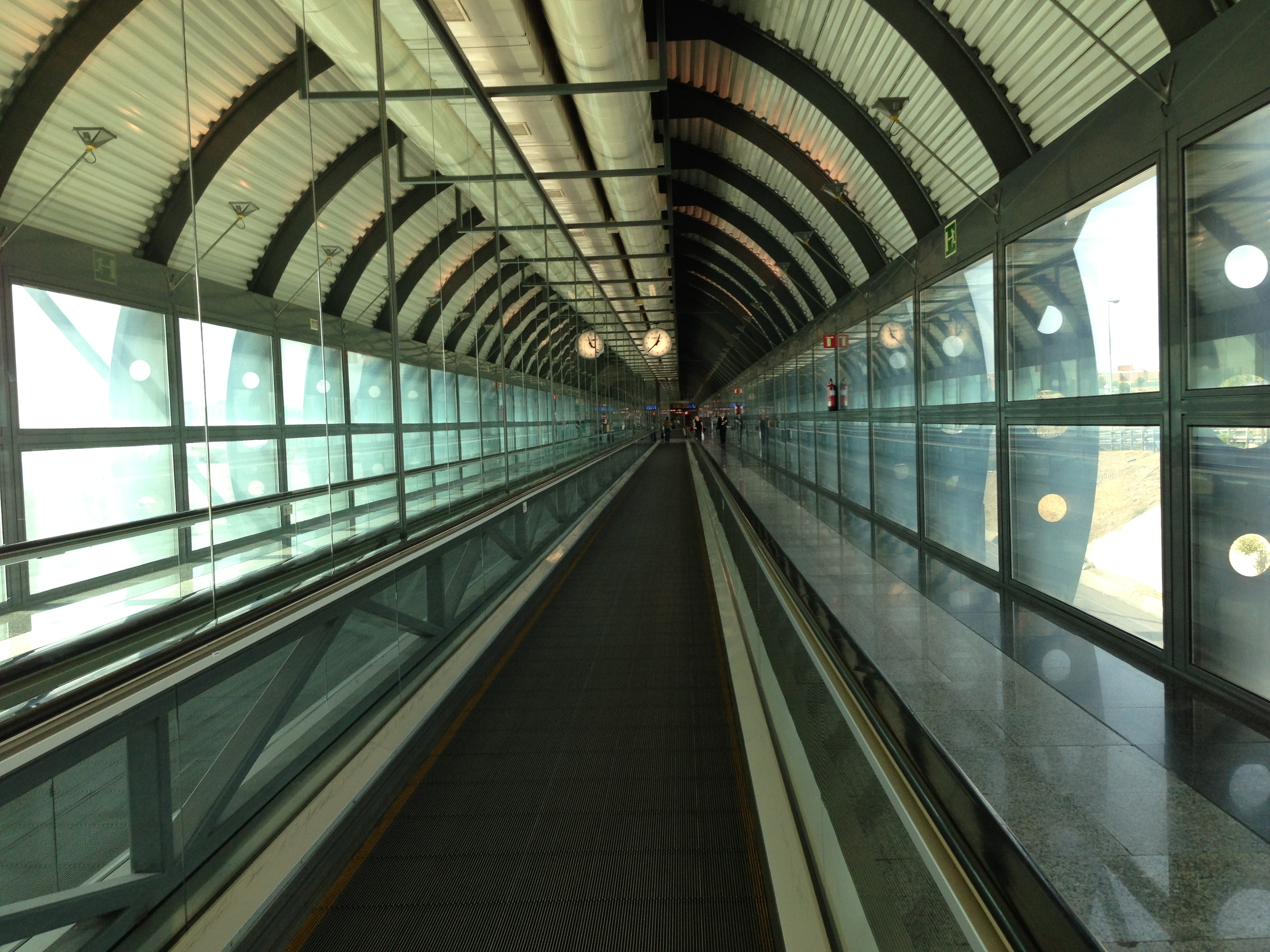 Pasillo en el aeropuerto de Madrid.